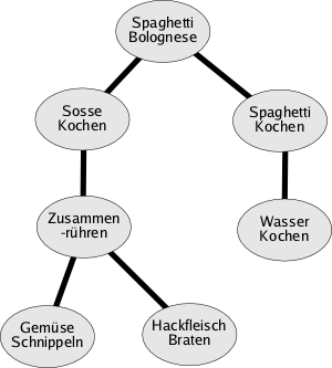 Beispiel eines Funktionsbaumes für Spaghetti bolognese.